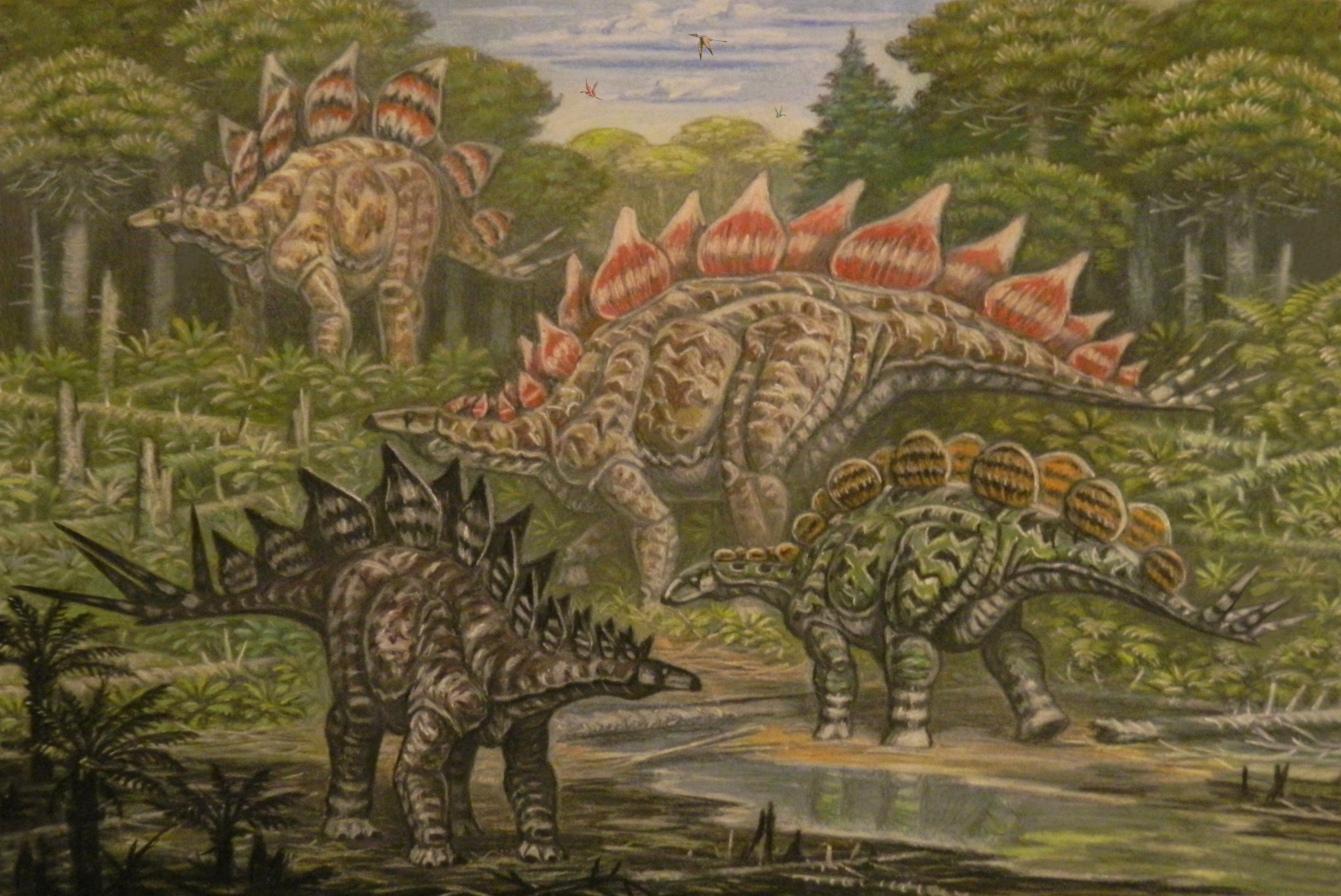 North American Stegosauridae. From upper left: Stegosaurus stenops, Stegosaurus ungulatus, Hesperosaurus mjosi, and Alcovasaurus longispinus.